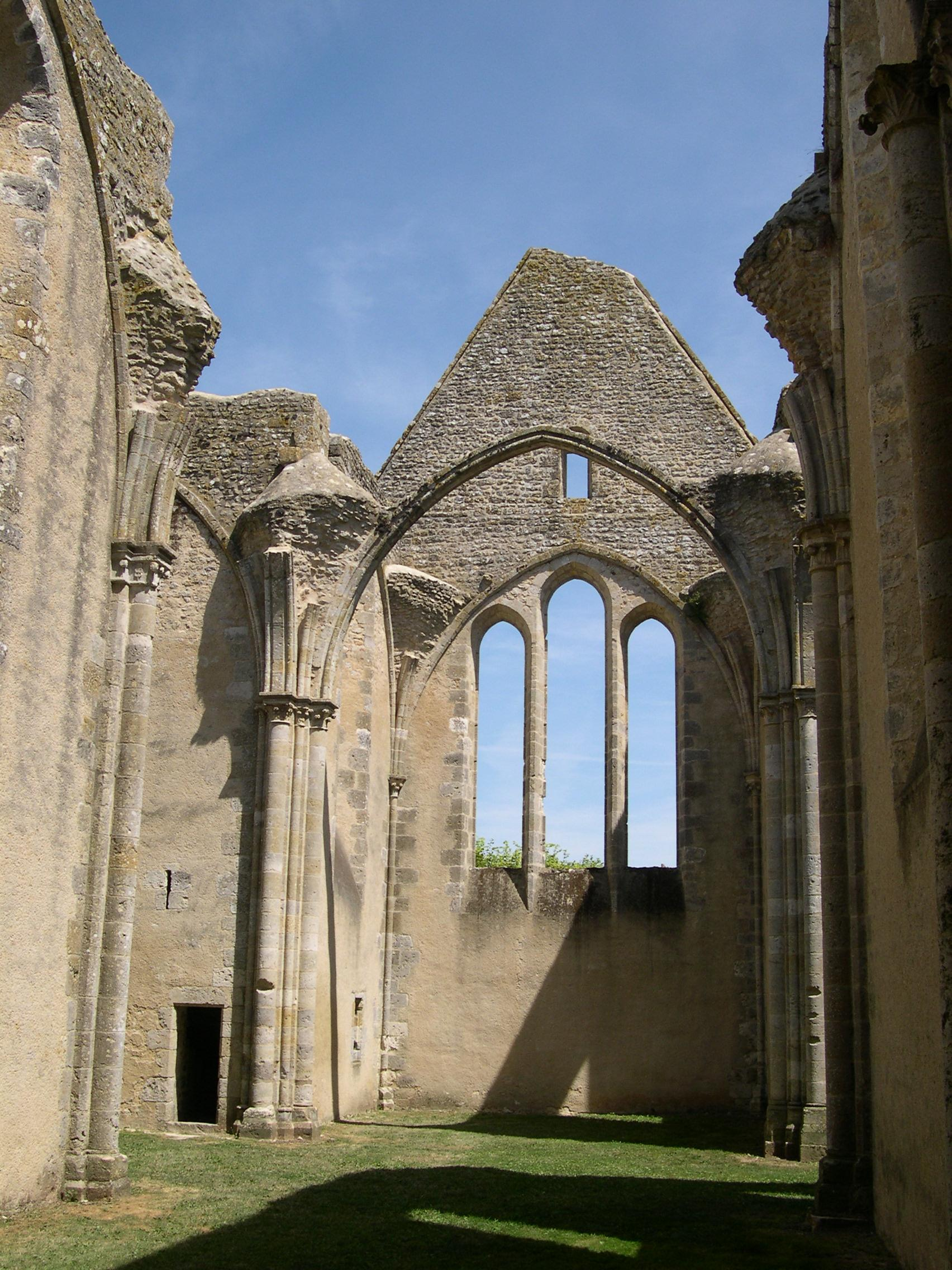 France Loiret Yèvre-le-Châtel Eglise Saint-Lubin Photographie prise par GIRAUD Patrick